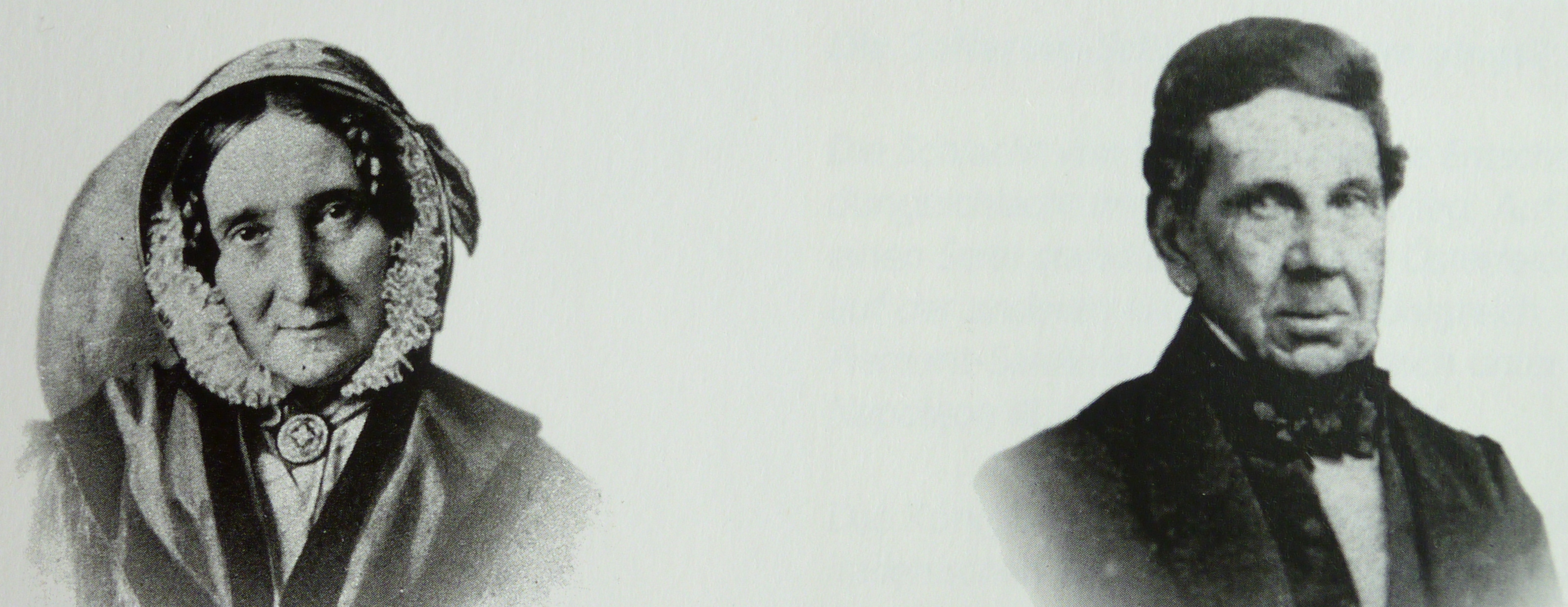 Anne-Antoinette Dunant-Colladon (1791-1868), Jean-Jacques Dunant (1789-1875) Eltern von Henri Dunant